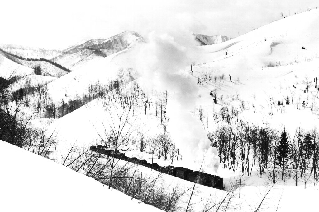 天北峠付近を走る国鉄9600形蒸気機関車。一ノ橋 - 上興部。）